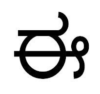 додда и